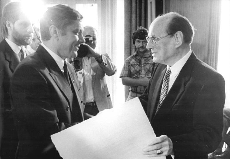 ADN-ZB Häßler 26.9.89 wü- Dresden: Ehrenbürgerschaft Der international bekannte Wissenschaftler Prof. Dr. h,c. mult. Manfred von Ardenne (r) wurde Ehrenbürger der Stadt Dresden. Die Würdigung wurde ihm aus Anlaß des 40. Jahrestages der DDR zuteil. Oberbürgermeister Wolfgang Berghofer (l), der die Urkunde überreichte, betonte, daß Dresdens Ruf als Stadt der Höchsttechnologie und Wissenschaften untrennbar mit Professor Ardennes Namen verbunden ist.